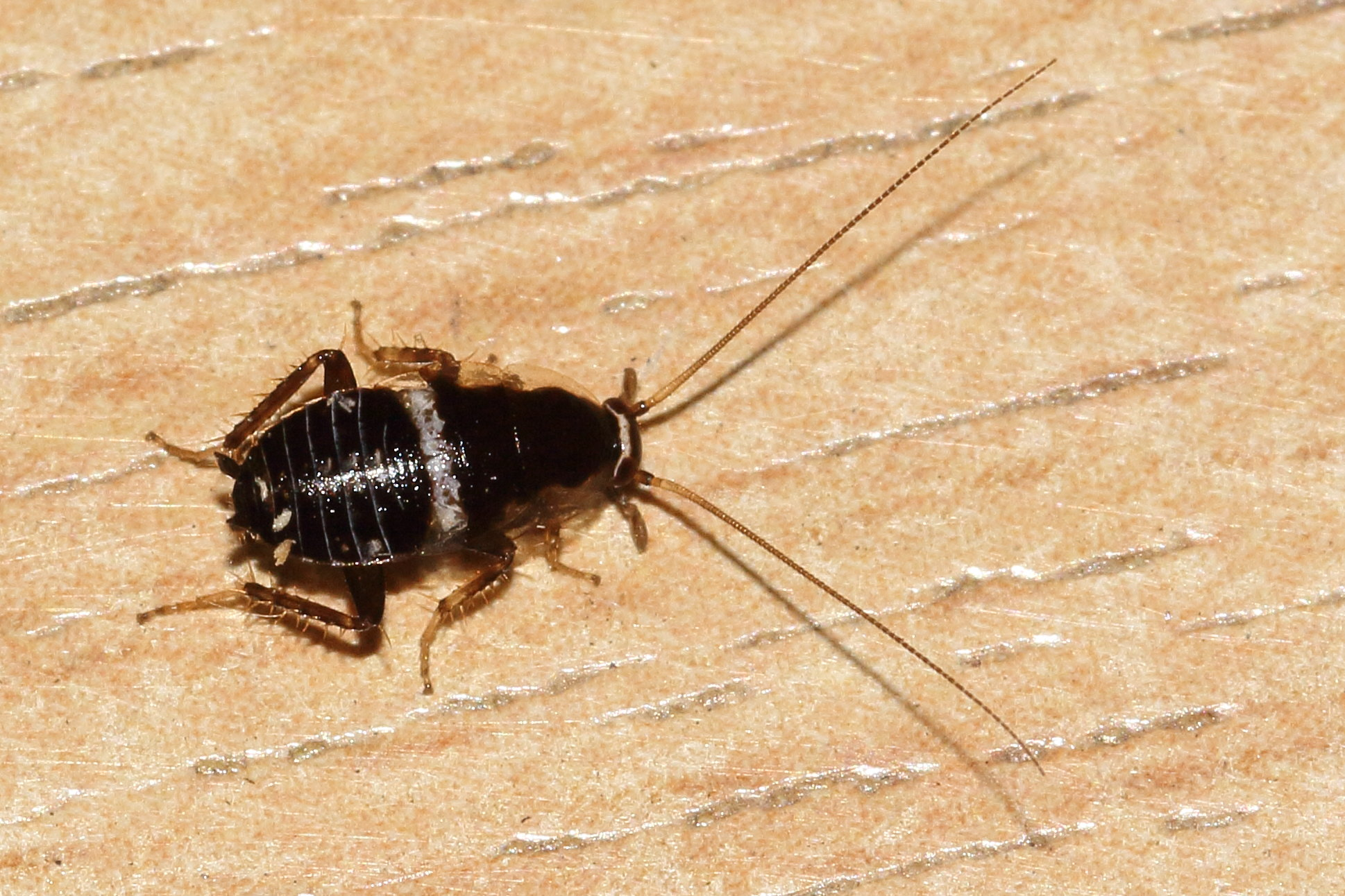 nymph of Planuncus tingitanus